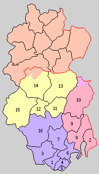 兵庫県赤穂郡の町村制時点の町村。